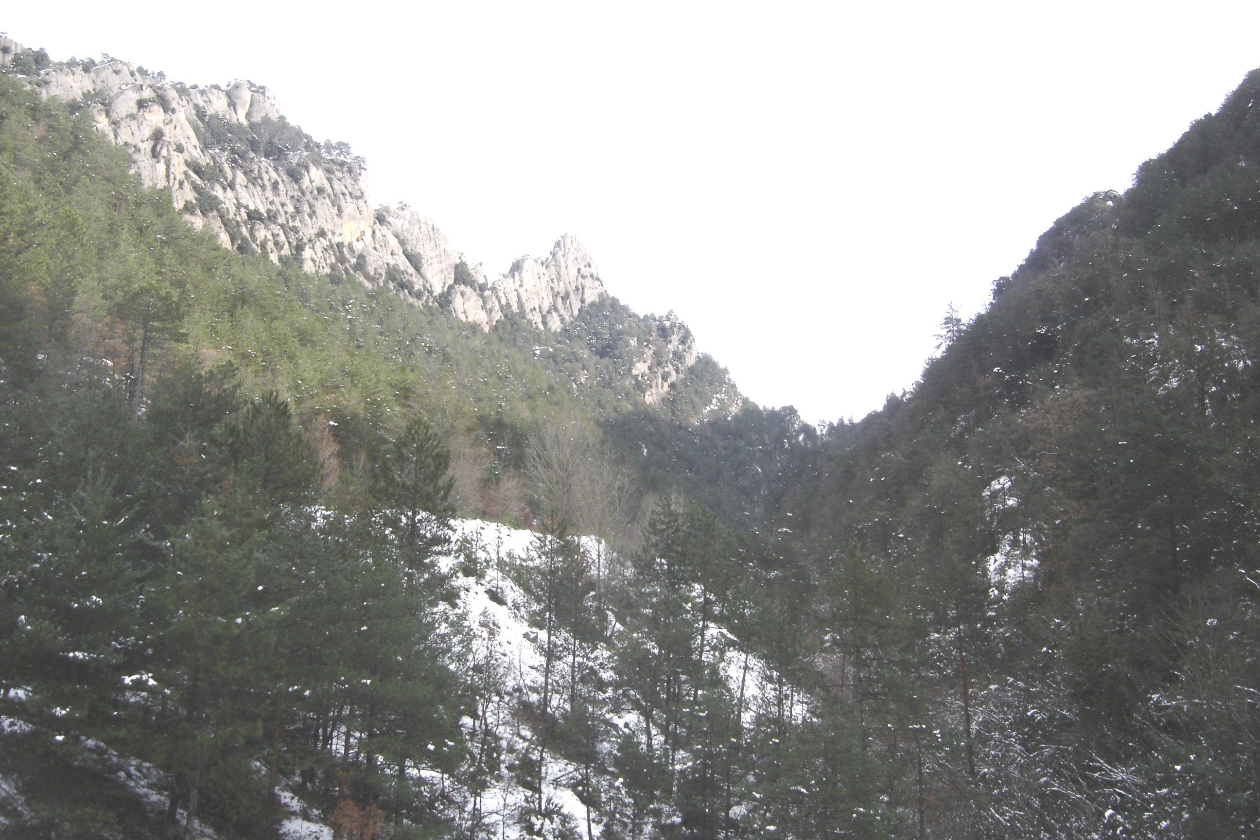 Bona part del curs de l'Aigua de les Set Riberetes (Guixers, Solsonès) vista des de la Carretera de Solsona a Sant Llorenç de Morunys per la Llosa del Cavall. A l'esquerra de la imatge, el vessant sud d'Els Llengots.